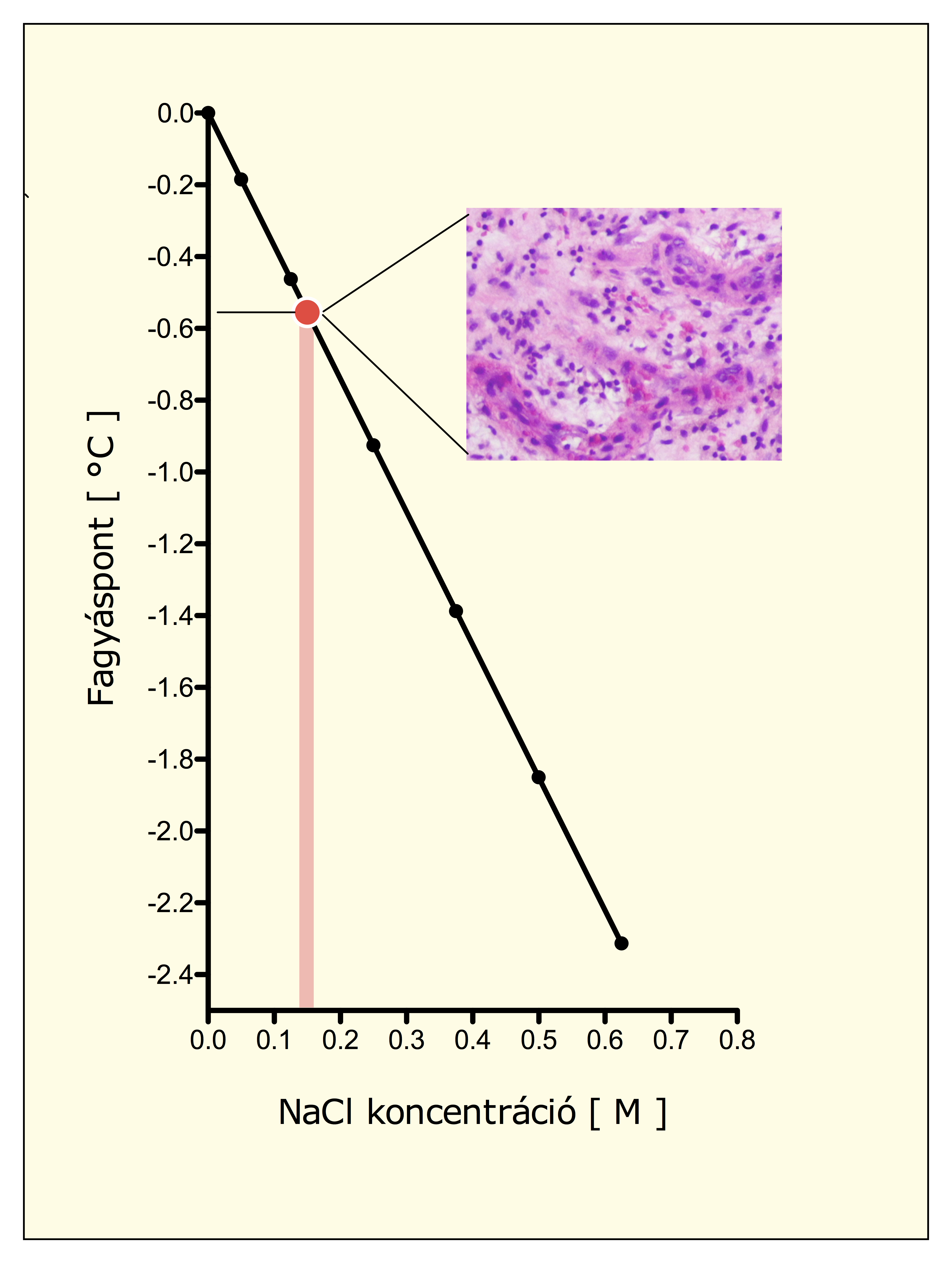 Fiziológiás NaCl oldat fagyáspontja összehasonlítva a testfolyadékkal